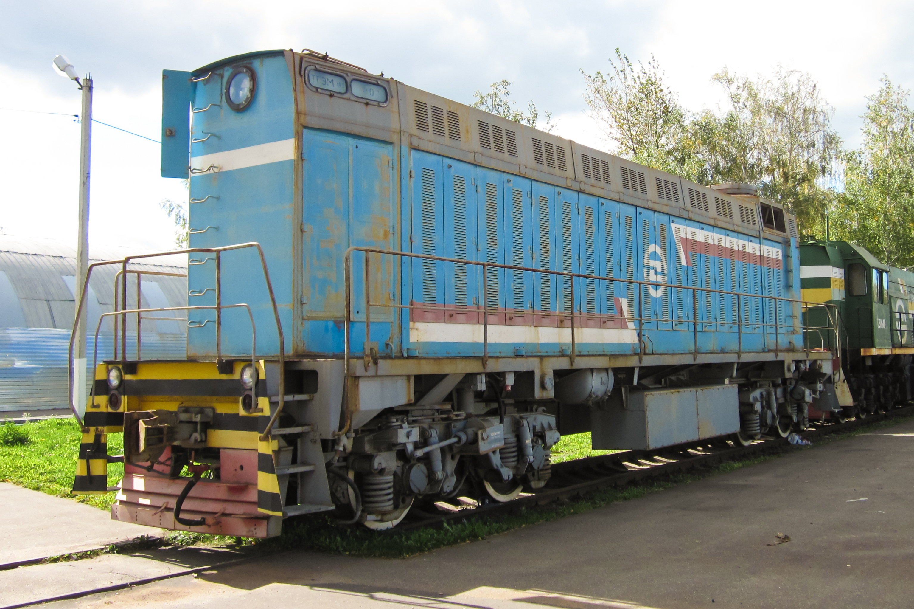 Бустерная секция газотурбовоза ТГЭМ10-0001 на выставке Экспо-1520 в Щербинке